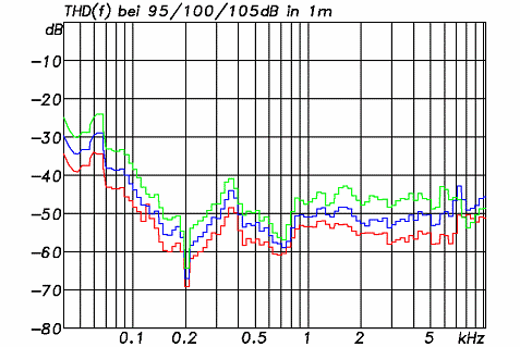 2Weg-2SubsKlirr